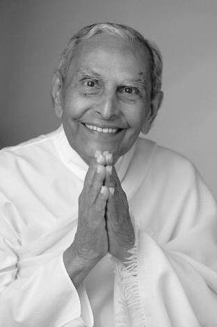 फोटो